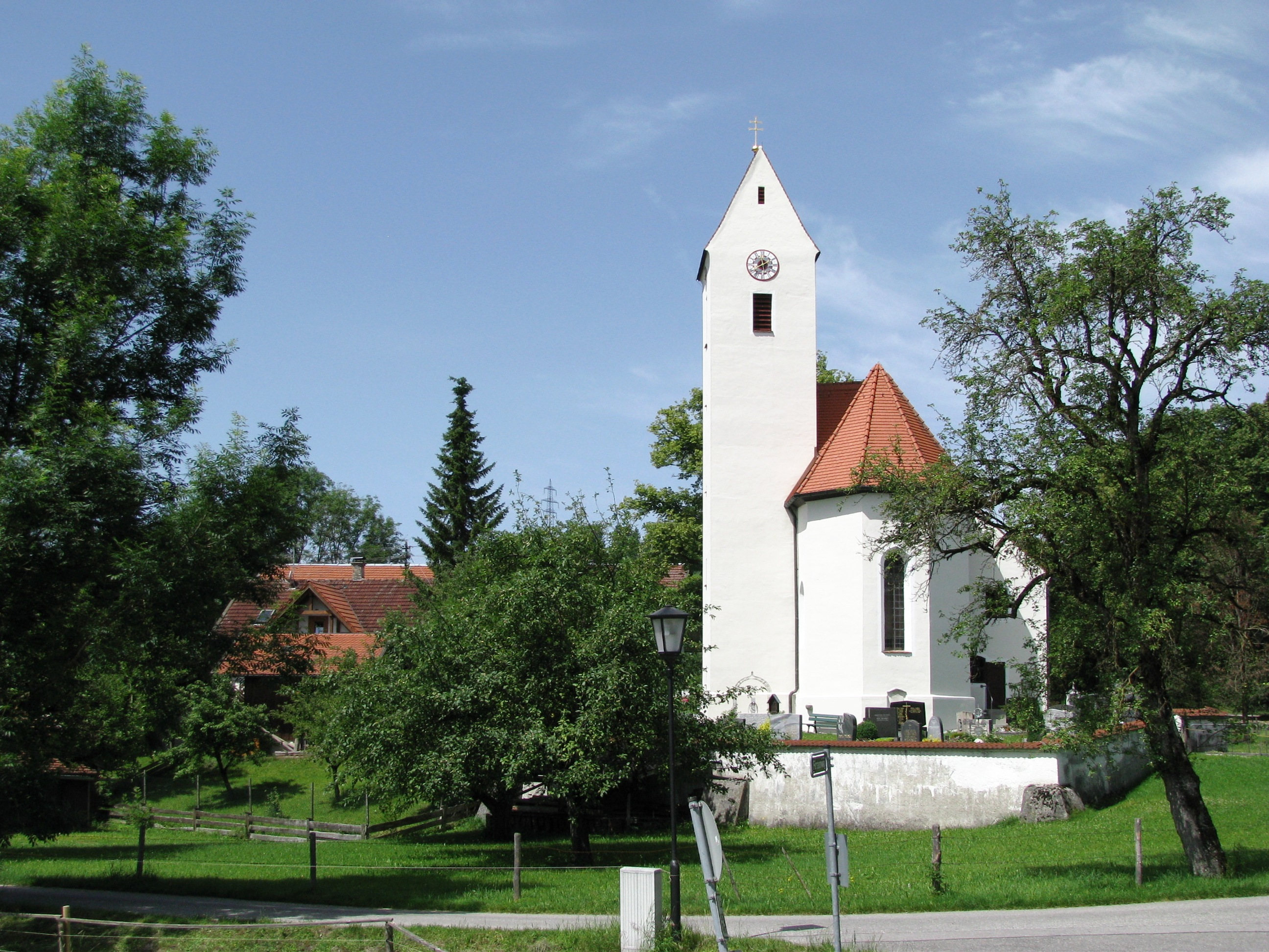 Kath. Filialkirche St. Martin in Zell, Gemeinde Großweil; spätgotischer Saalbau mit eingezogenem Chor und südöstlichem Sattelturm, barock verlängert. This is a photograph of an architectural monument.